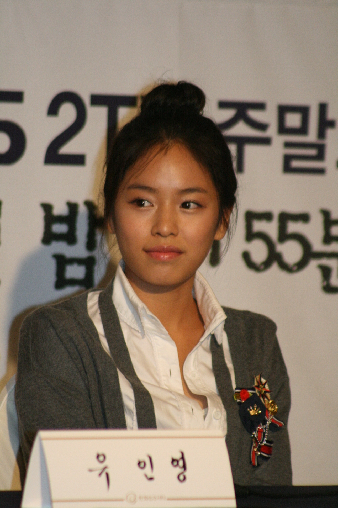 내사랑 금지옥엽 제작발표회